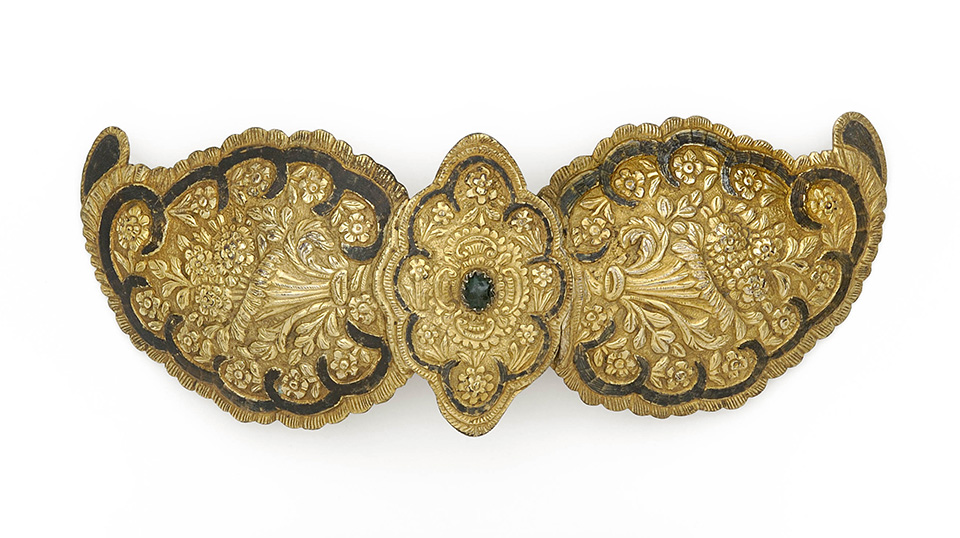 Srpski (latinica): Pafta; početak XIX veka; bronza, pozlata, savat, livenje; Muzej primenjene umetnosti u Beogradu, inv. br. 323; iz zbirke Ljube Ivanovića